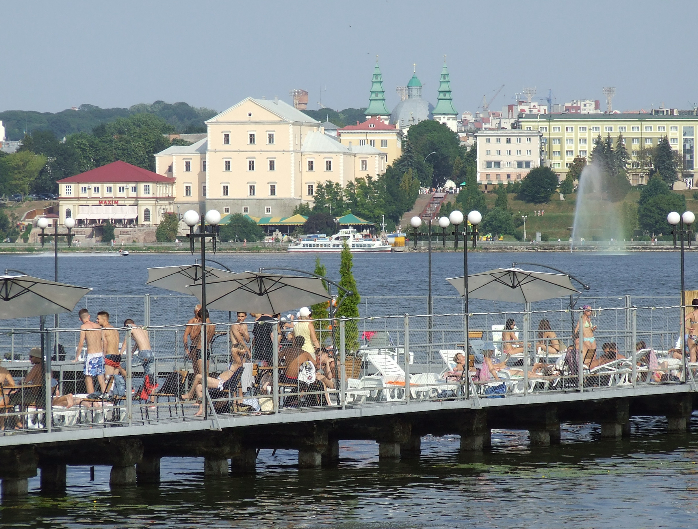 Пляж "Riviera beach" на Тернопільському ставі